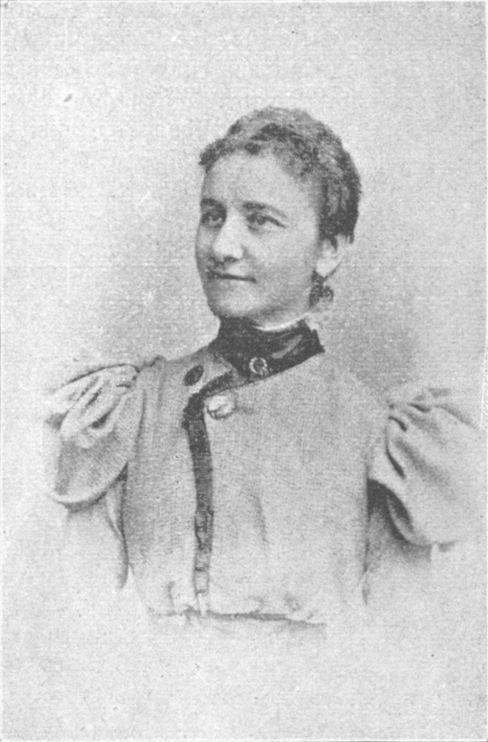 Gabriele Possanner von Ehrenthal (Gabriele Possanner Edle von Ehrenthal; 1860-1940), Austrian physician